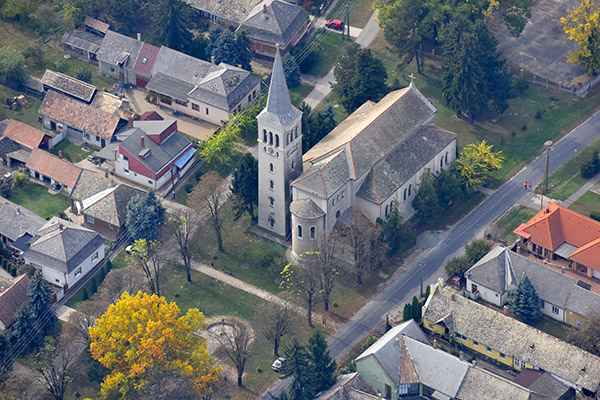 Nepomuki Szent János-templom légi felvételen, Sióagárd